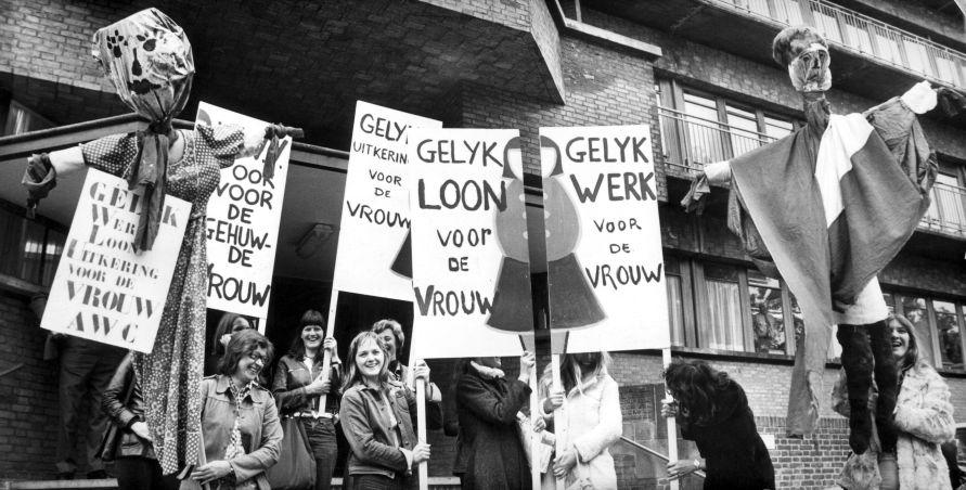 Vrouwen van het Amsterdams Werklozen Comitee demonstreren bij het Departement van Sociale zaken in Den Haag voor gelijke beloning bvoor de vrouw, 29 mei 1975. Minister Boersma kreeg daarna een eisenpakket en een pop aangeboden.